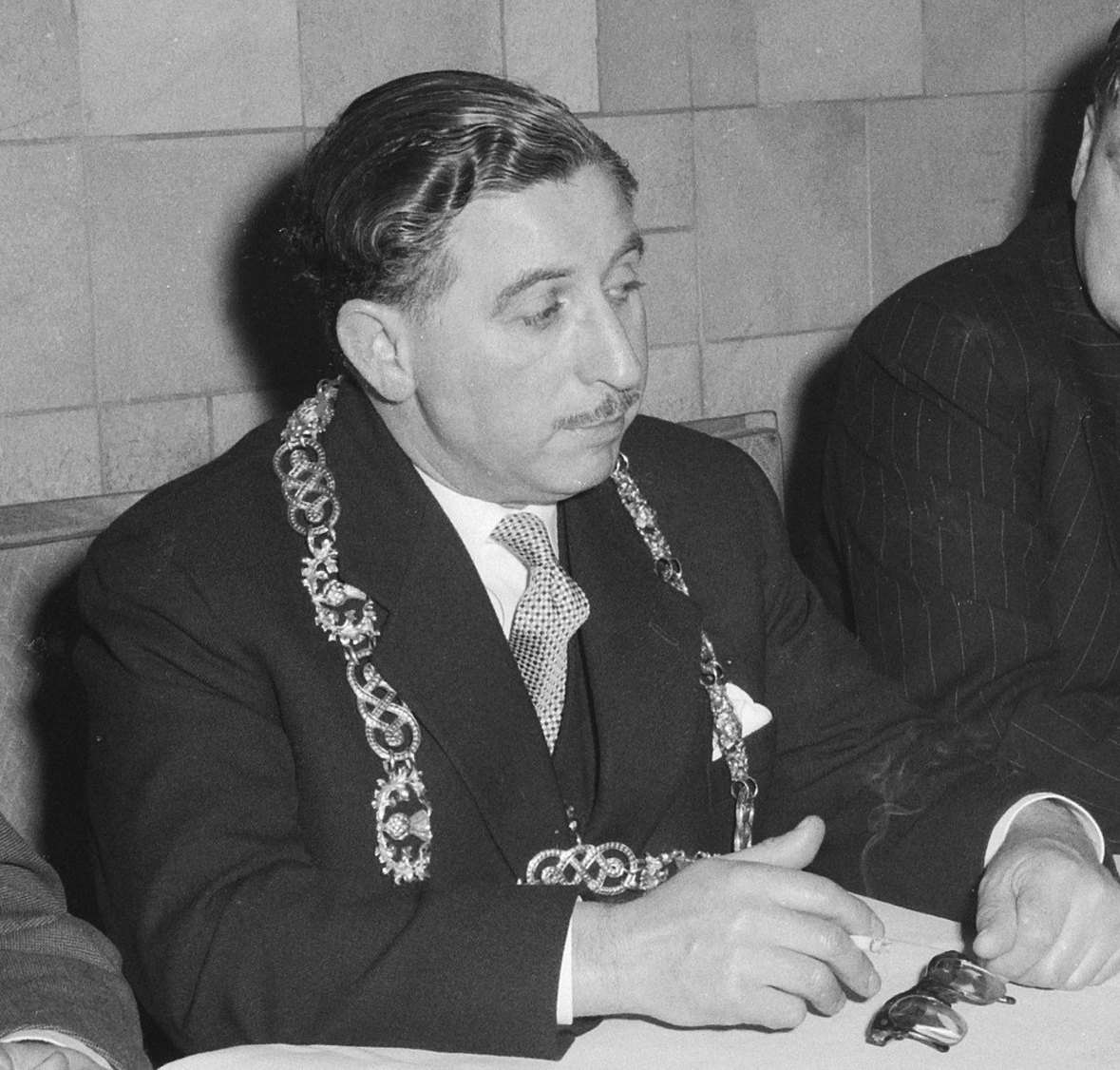 Aankomst Lord Provost van Glasgow op Schiphol, de Lord Provost tijdens de persconferentie